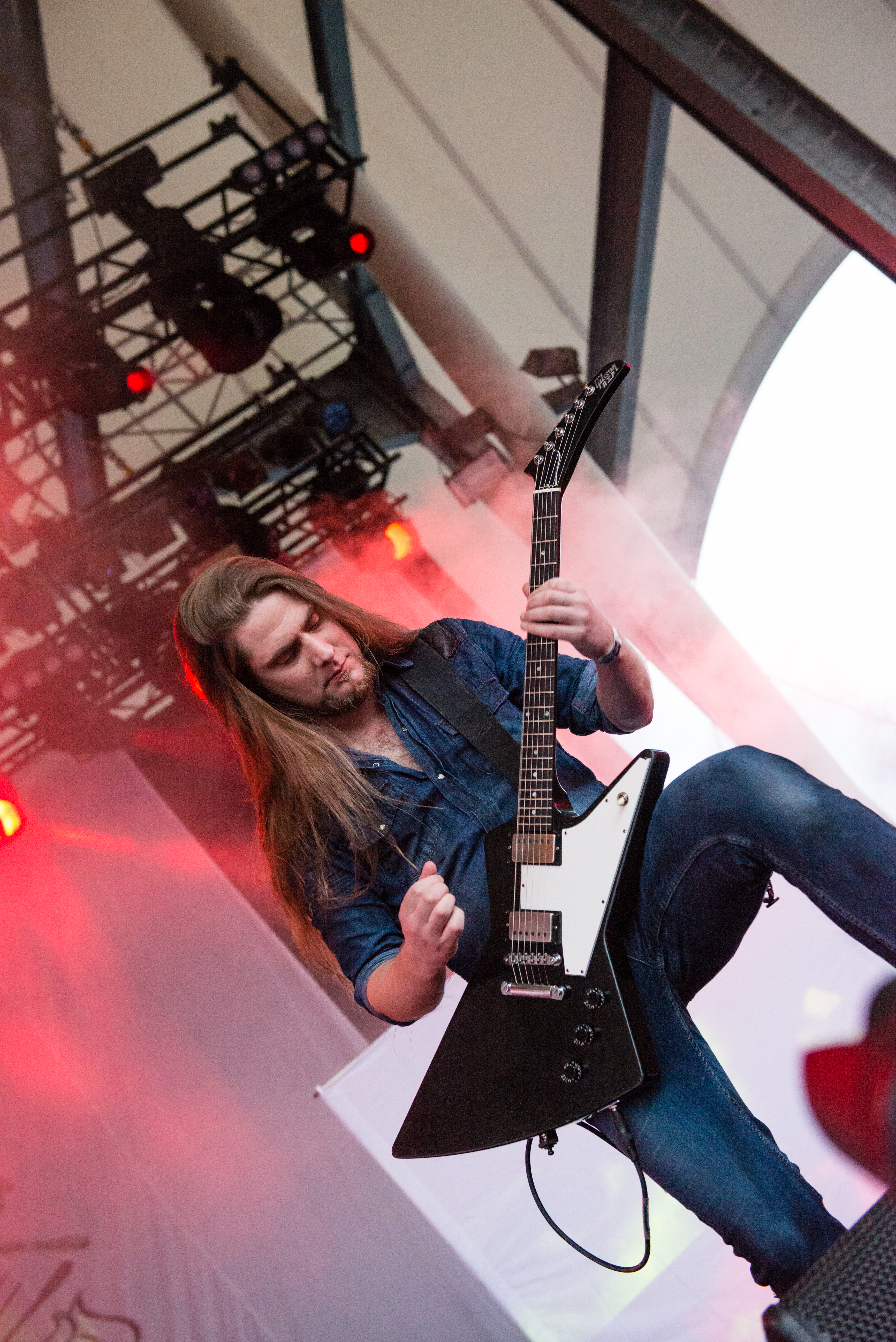 'Rock Hard Festival 2014 - Gelsenkirchen': 'Carcass'